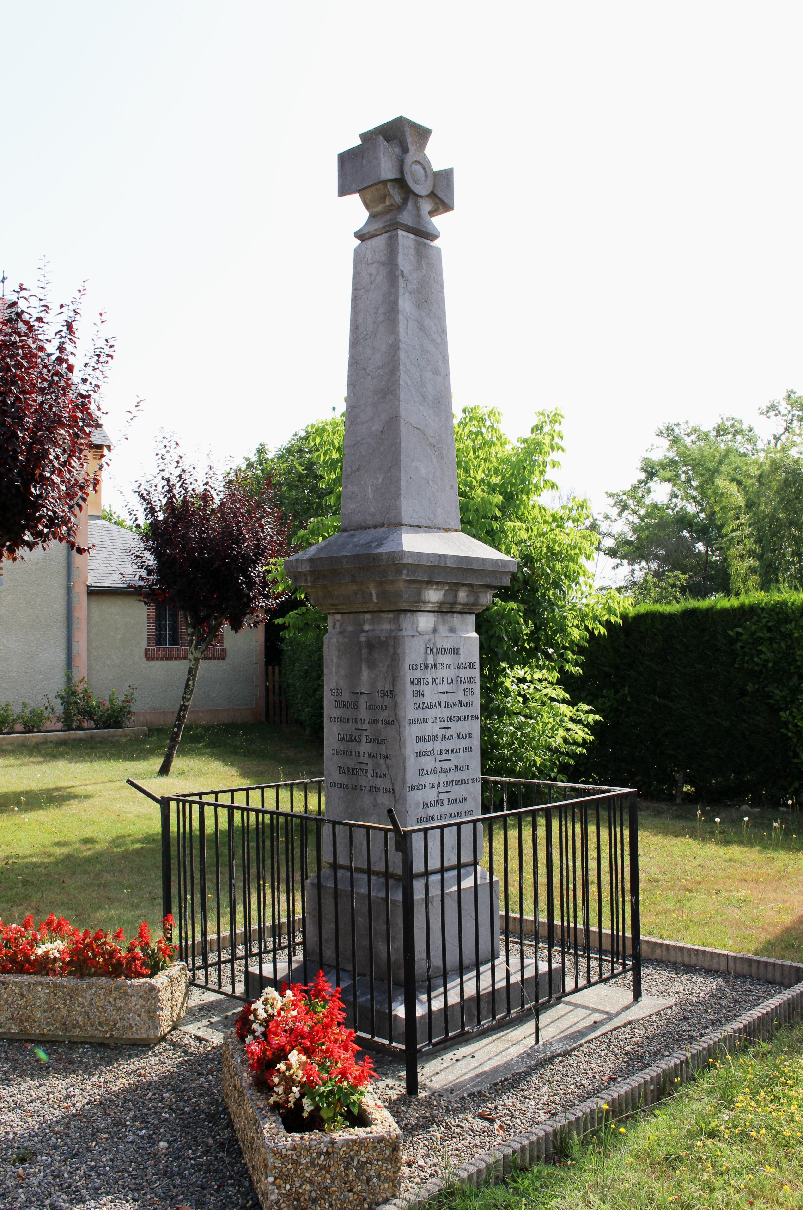 Monument aux morts de Lagarde (Hautes-Pyrénées)